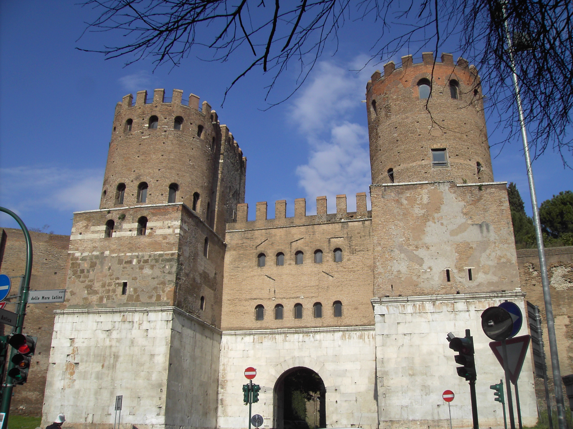 Roma , Porta san Sebastiano